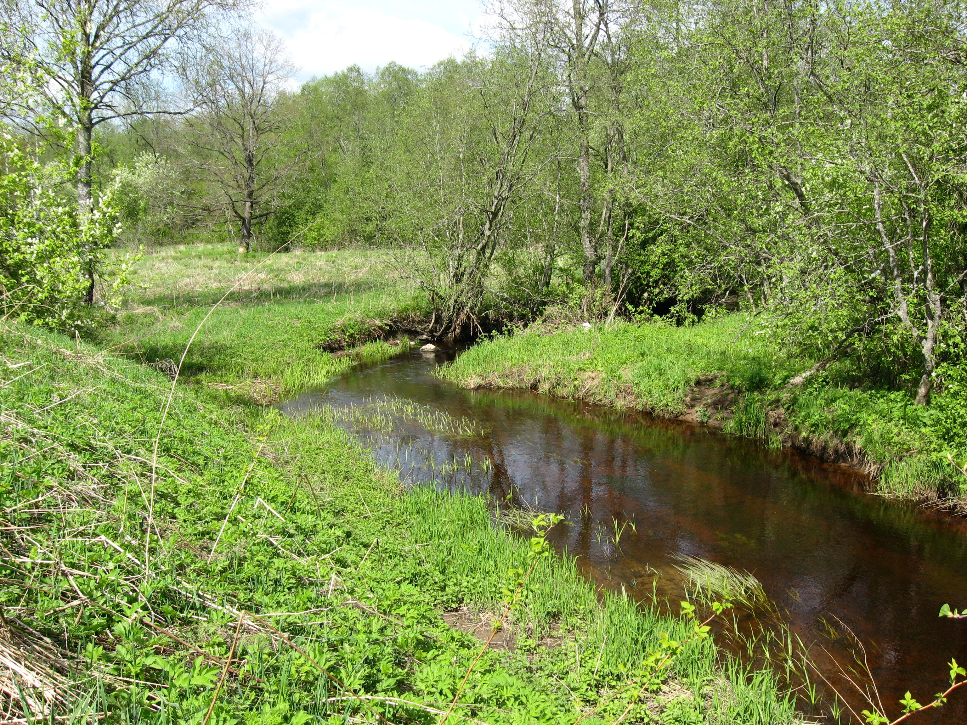 Река Ктинянка (Ктинка) в дер.Большие Болота